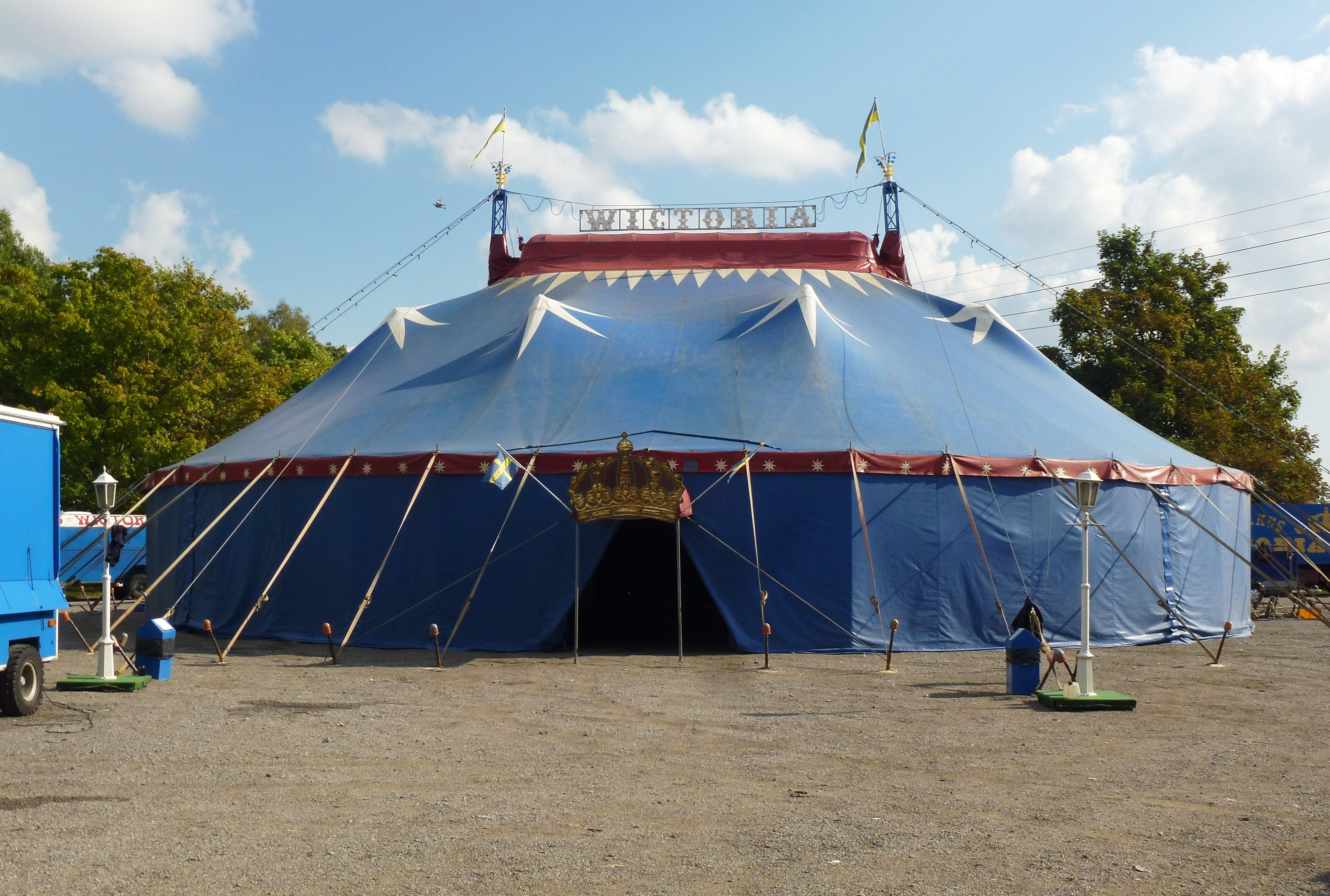 Cirkus Wictoria i Västberga